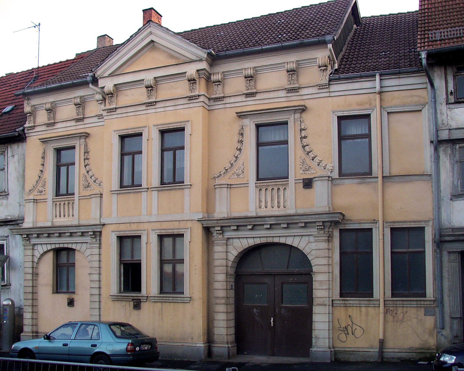 Gotha, Siebleber Straße 24, Stadtpalais der Familie von Wangenheim, später Sitz der „Engelhard-Reyherschen Hofbuchdruckerei“ (2003), abgebrochen 2011